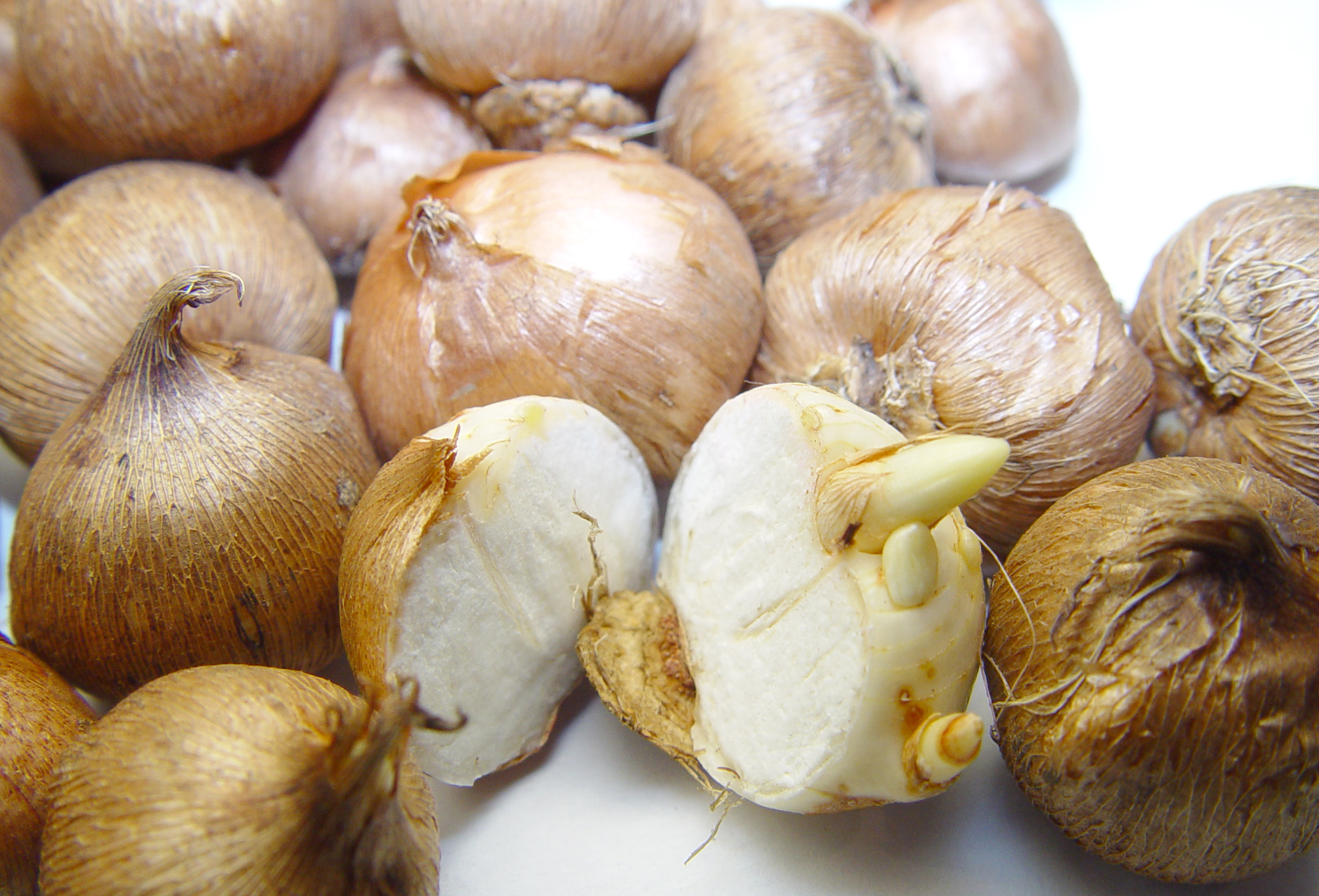 Crocus_sieberi_-_tricolor. bulbs